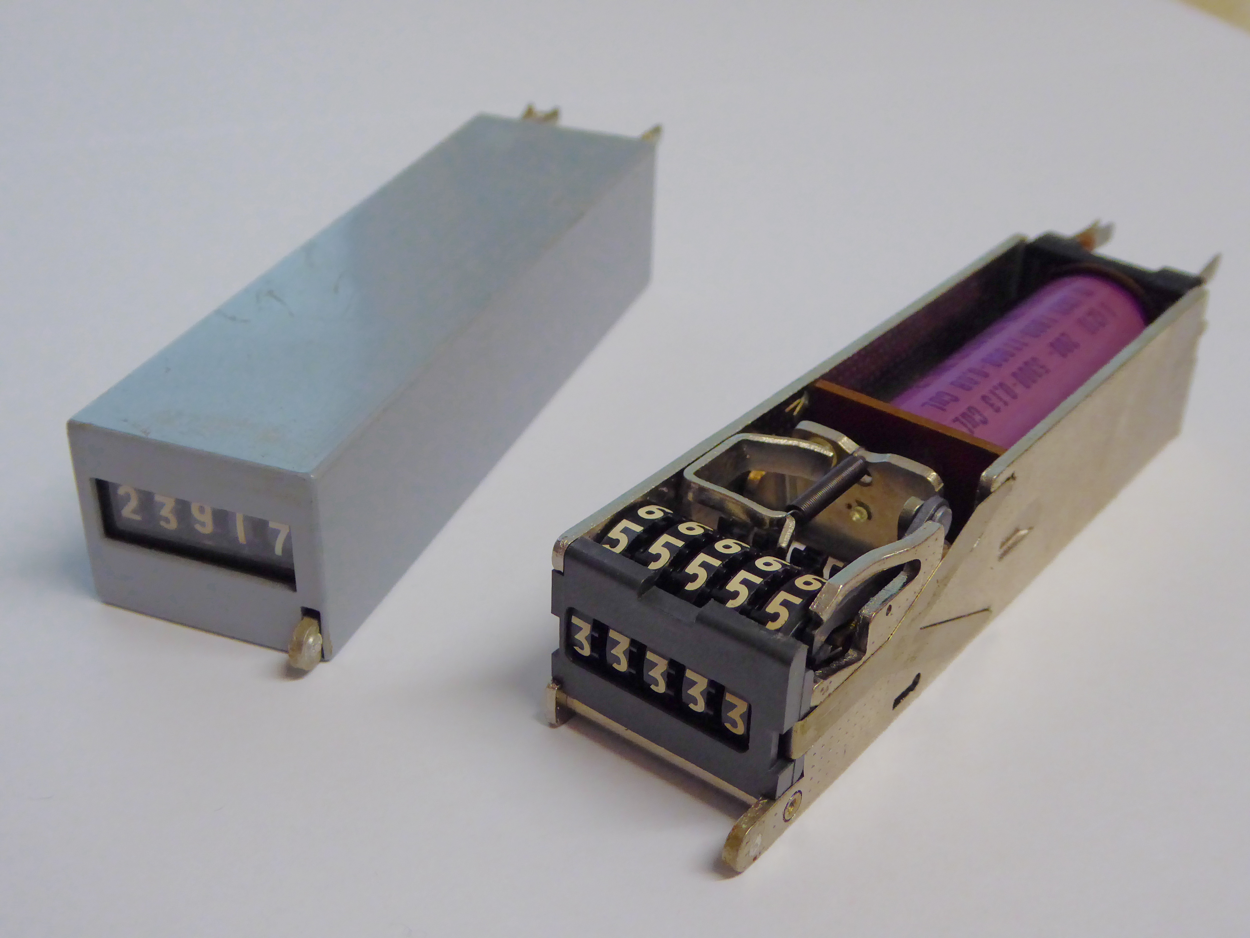 Gebührenzähler 57; rechts geöffnet, sichtbar sind Spule, Anker, Stoßklinke und Rollenzähler.